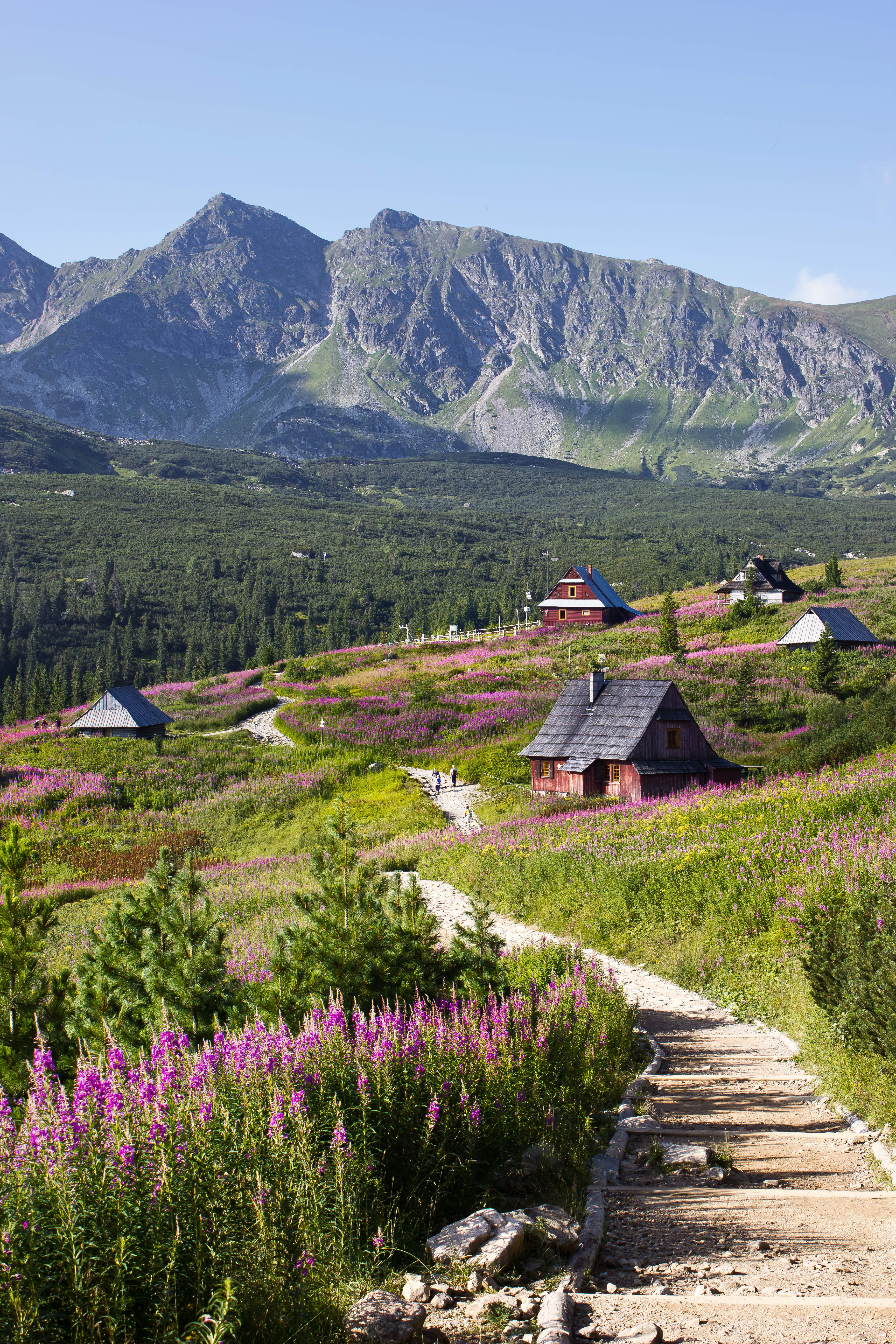 Obszar specjalnej ochrony ptaków Tatry. This is a photography of Natura 2000 protected area with ID PLC120001